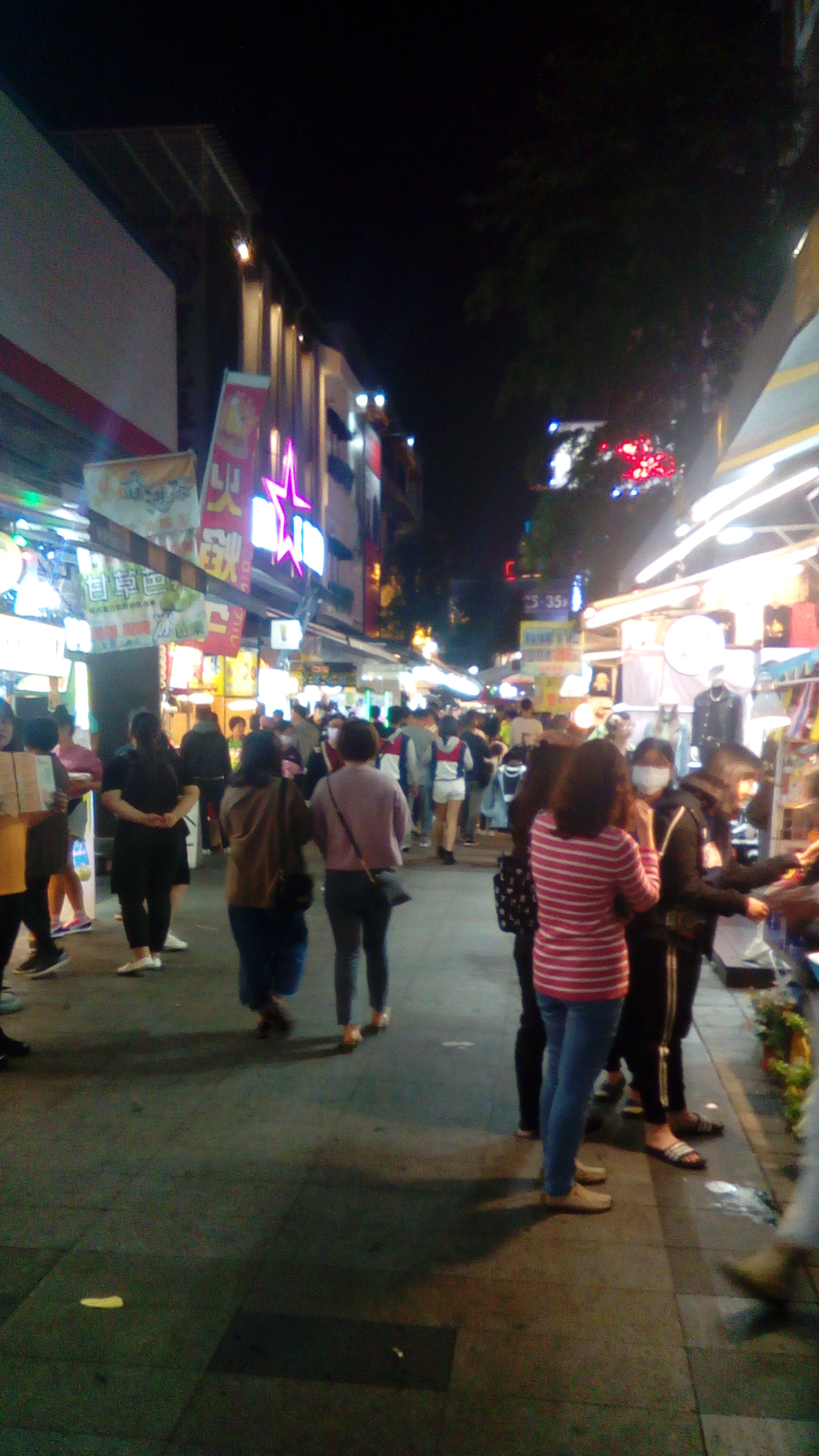 高雄市新興區 中山路&新田路口